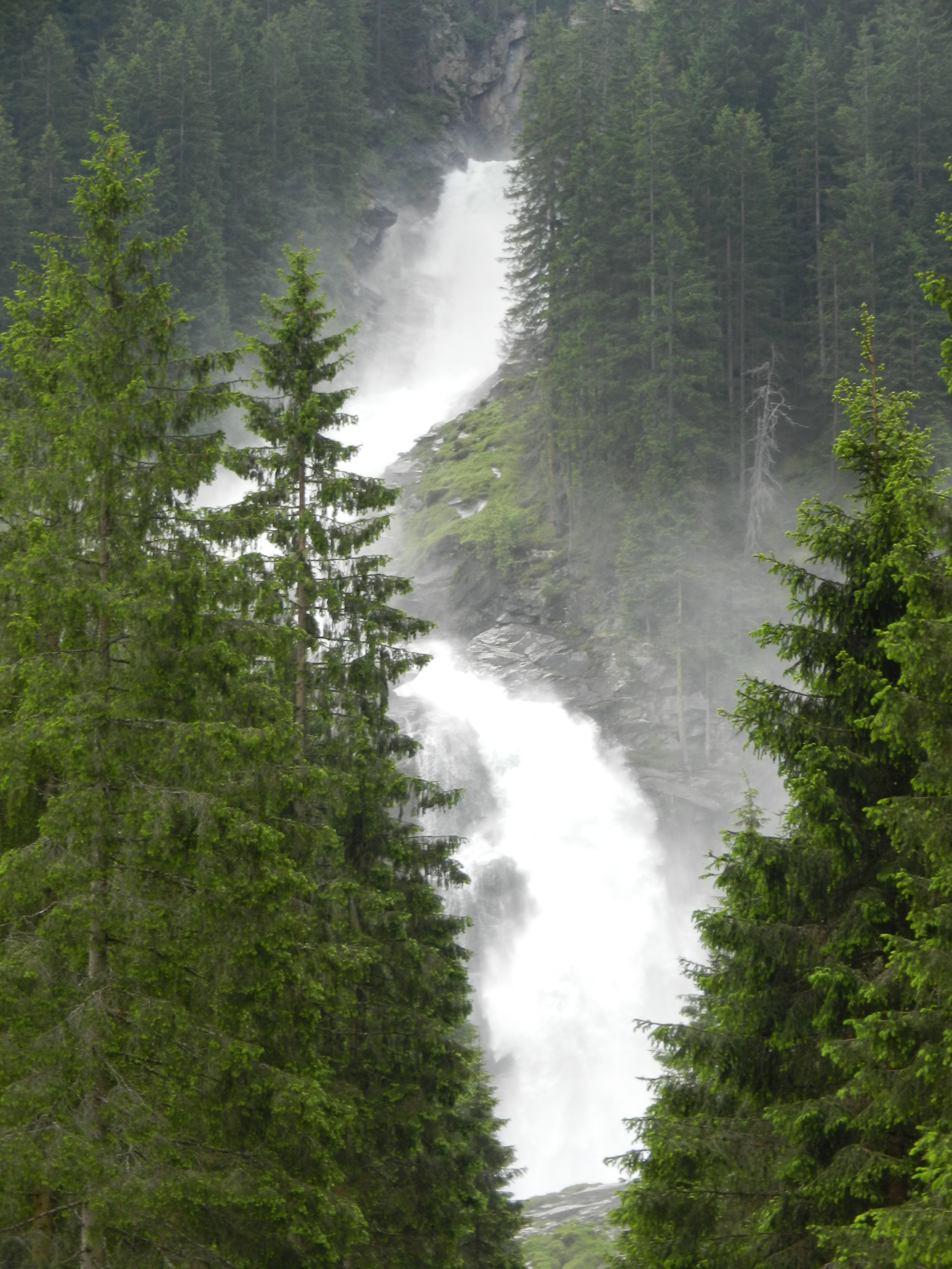 Krimmlski spodnji in srednji slap